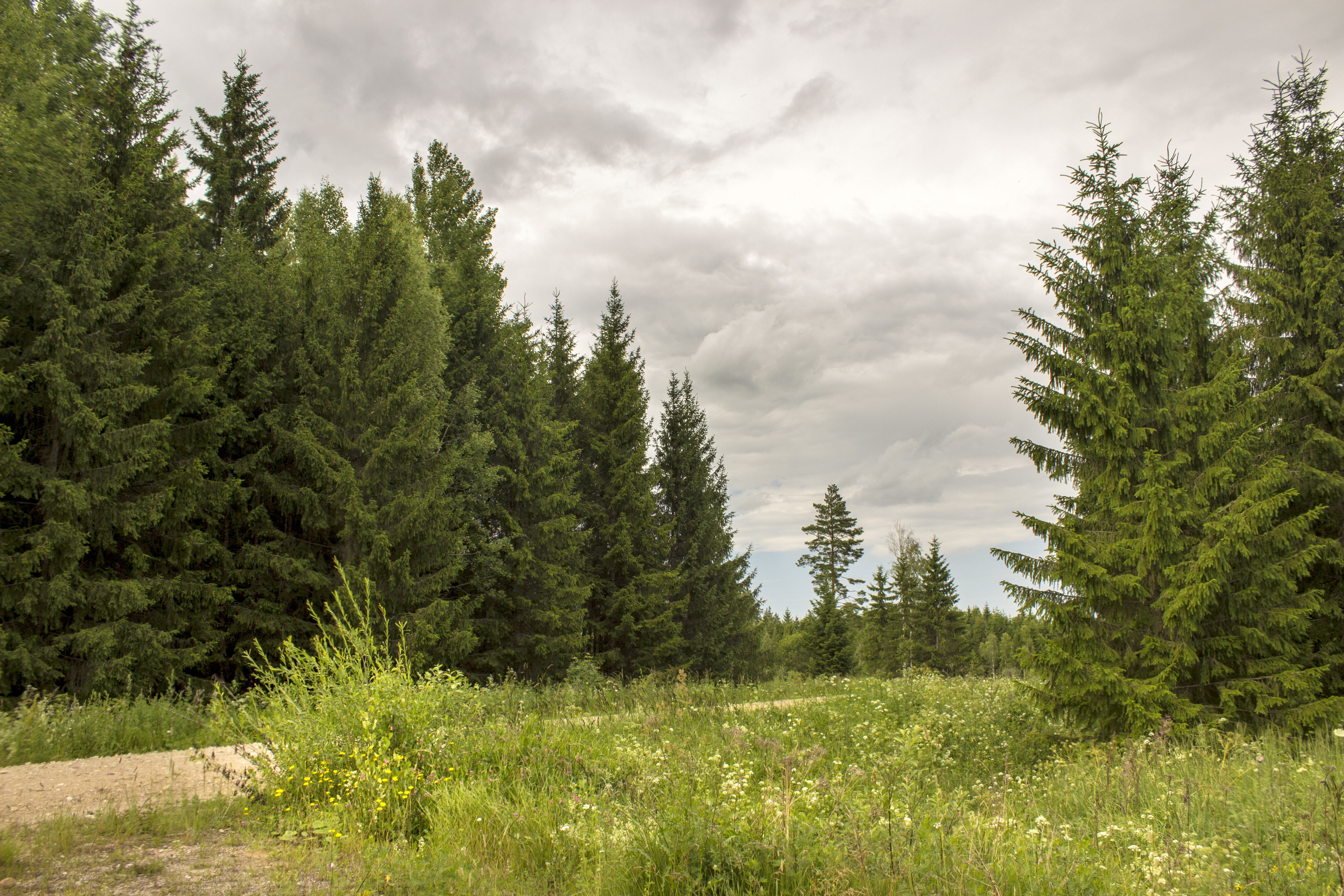 Varieba